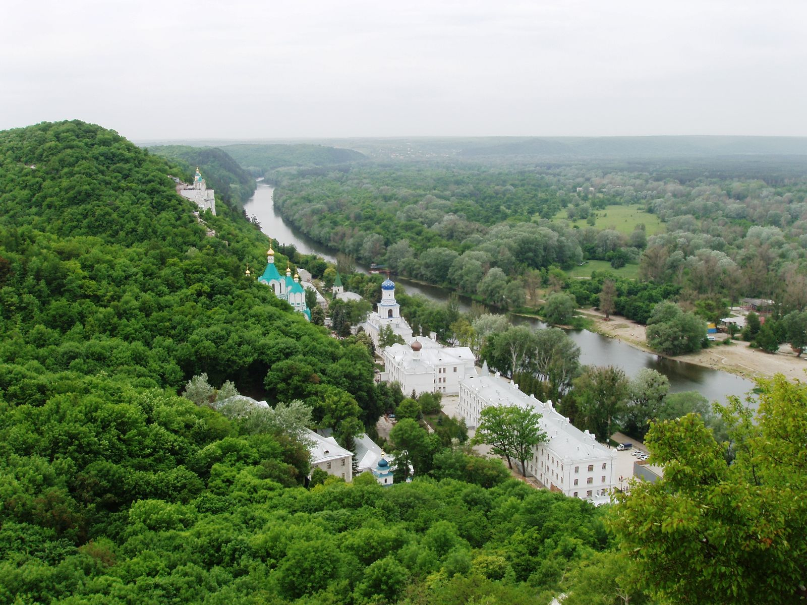 Святогірський монастир